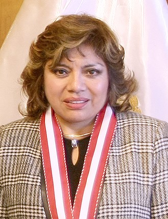 Fiscal de la Nación preside Junta de Fiscales Supremos. Pedro Chávarry, Pablo Sánchez, Zoraida Ávalos, Tomas Gálvez Villegas y Víctor Rodríguez.